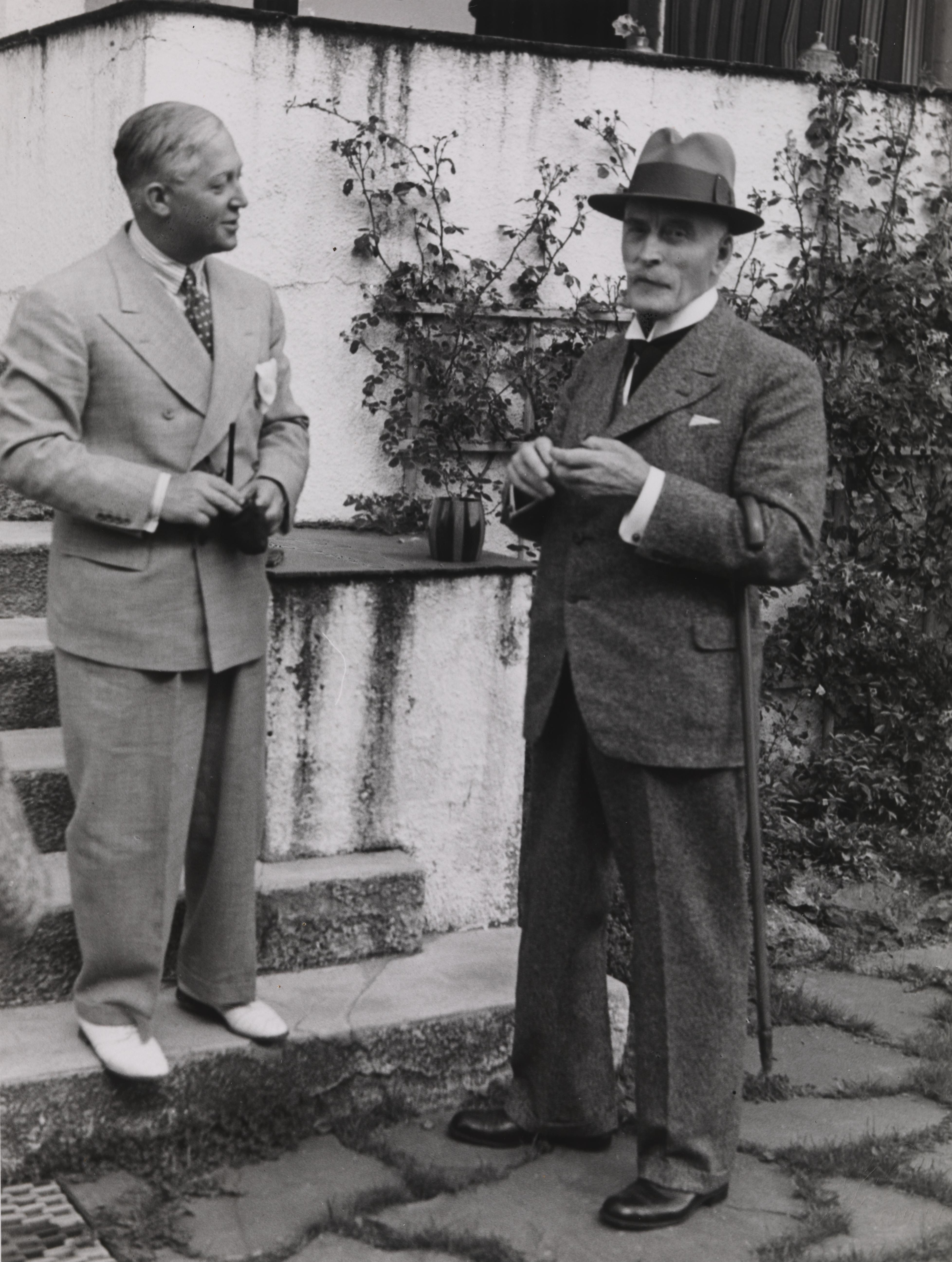 Bildet er hentet fra Nasjonalbibliotekets bildesamling Depicted person: Grieg, Harald Depicted person: Hamsun, Knut